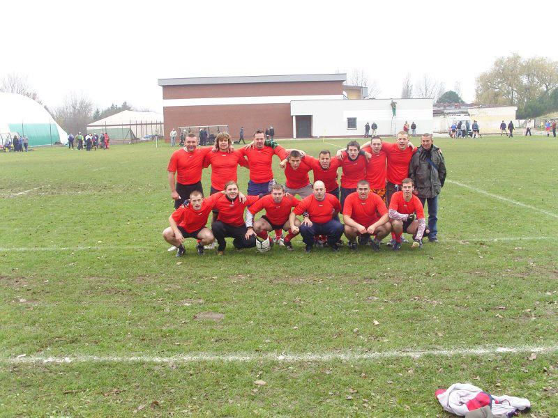 Zdjęcie drużyny AZS ZUT Rugby Szczecin - Turniej Koszalin 2009